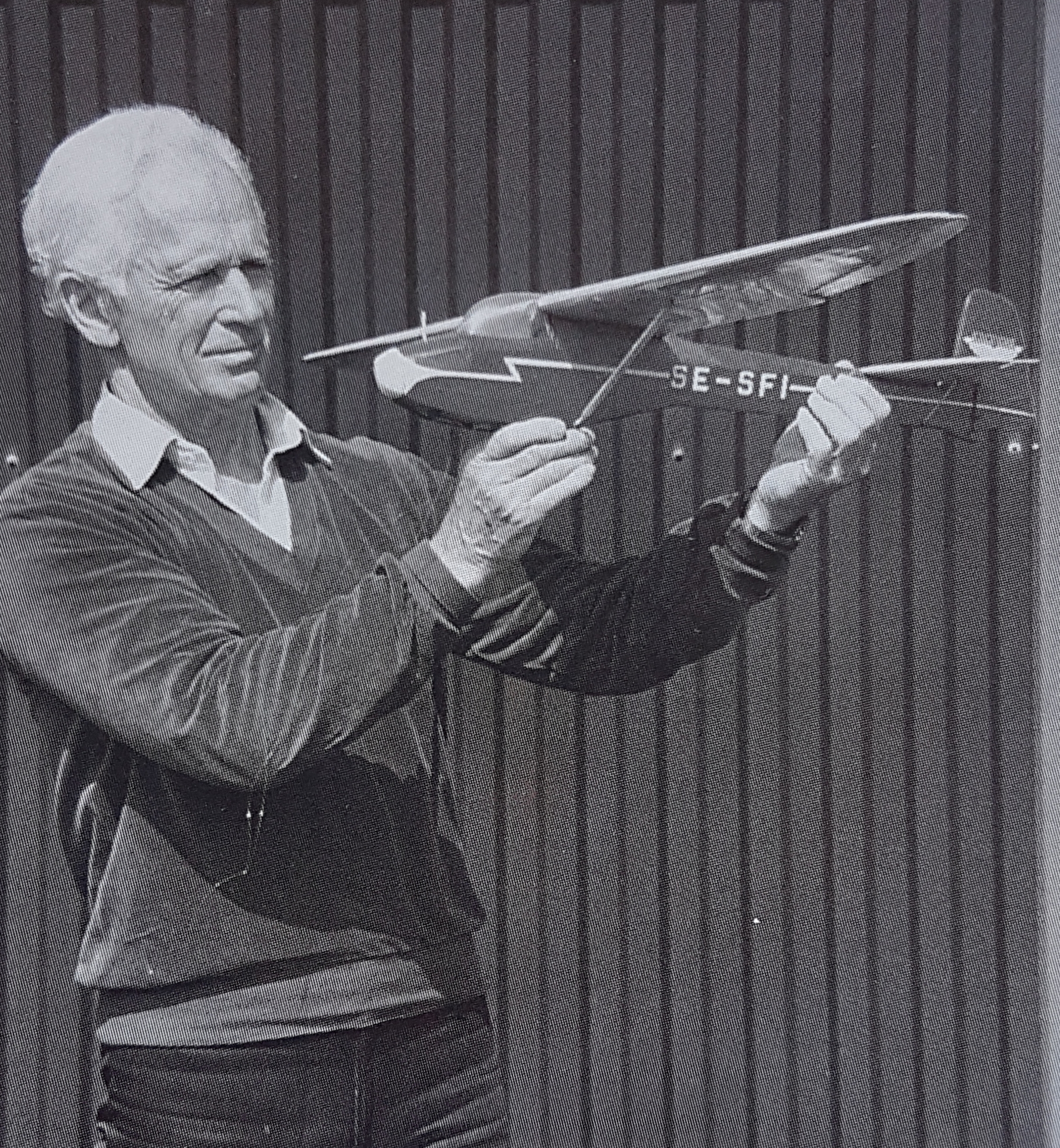 Lennart Hemminger med modell av sitt eget konstruerade segelflygplan